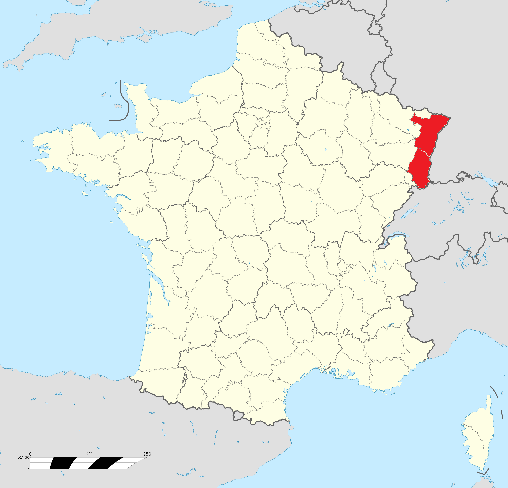 L'Alsace (départements du Bas-Rhin et du Haut-Rhin).